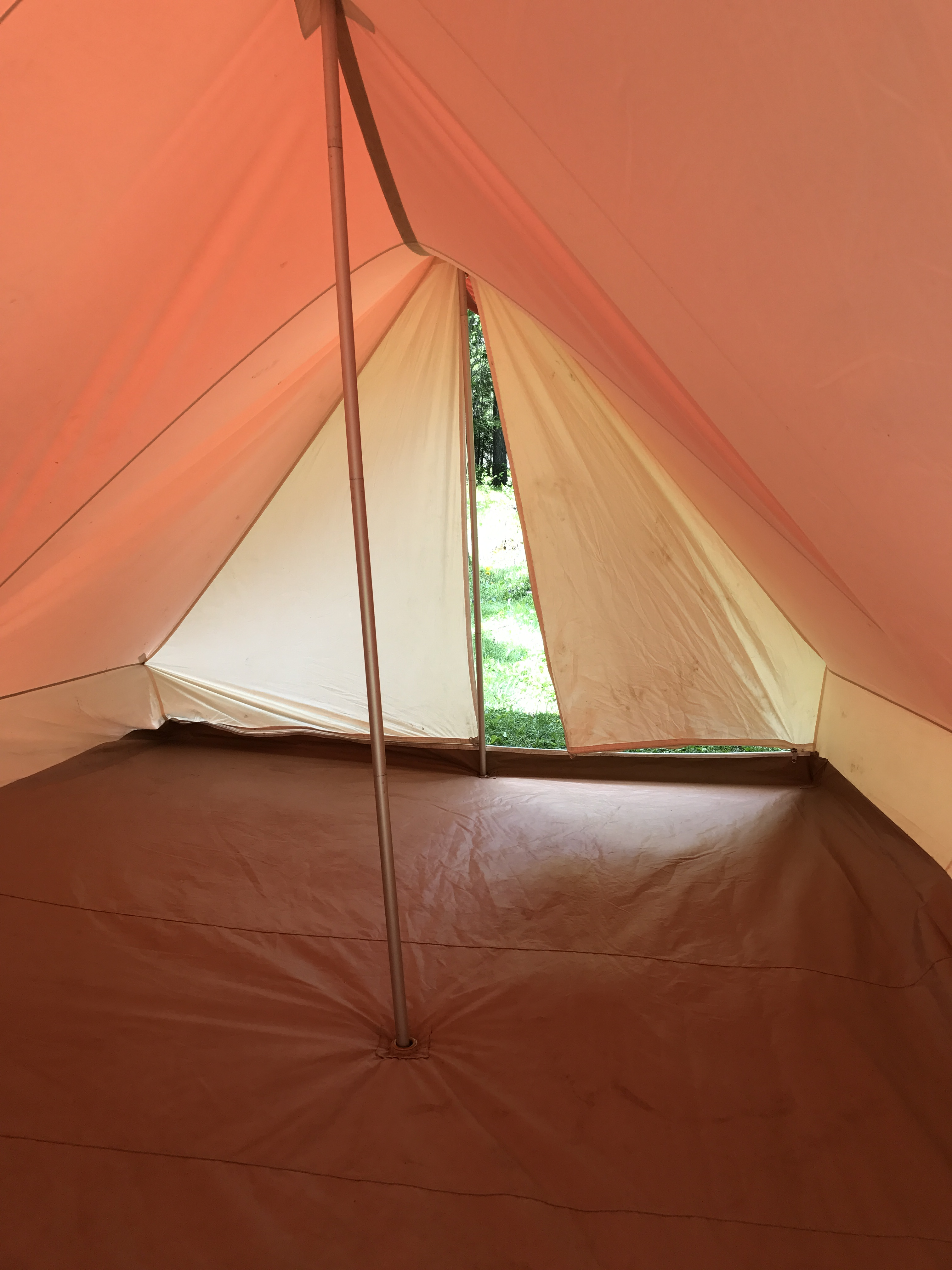 In einem Spatz-Achterzelt